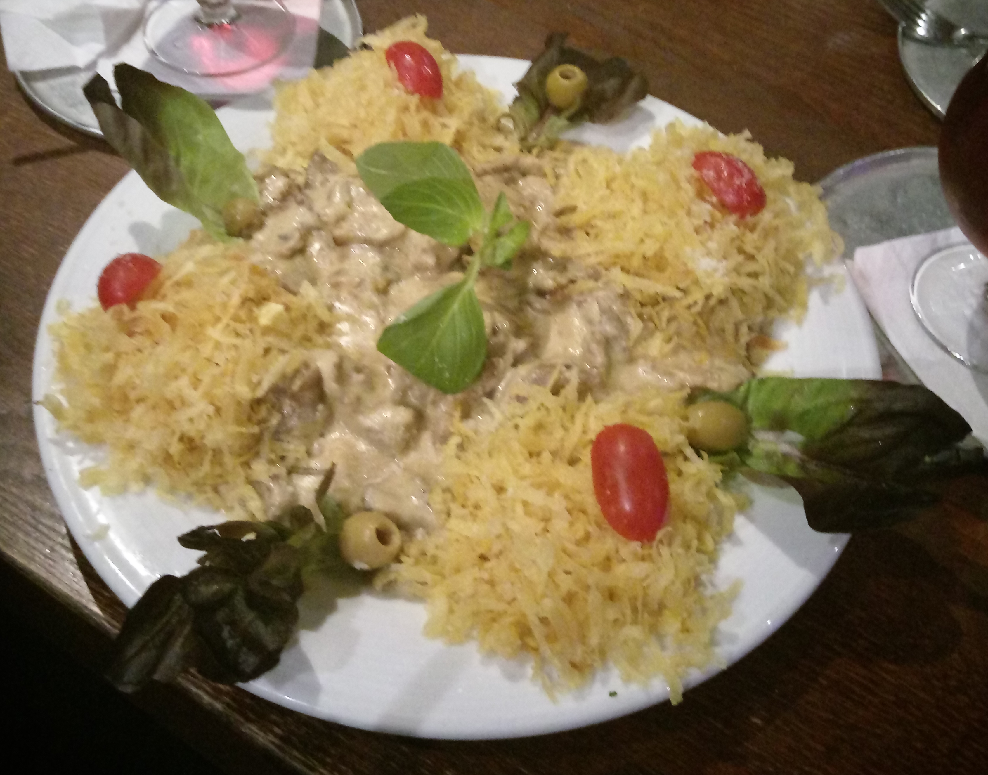 بیف استروگانف